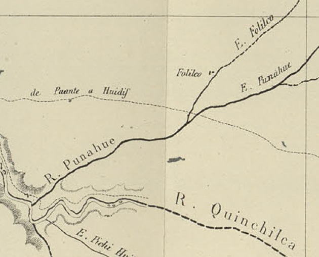 Rio Punahue y Estero Folilco en el Mapa de Expedicion de la Francisco Vidal Gormaz 1869